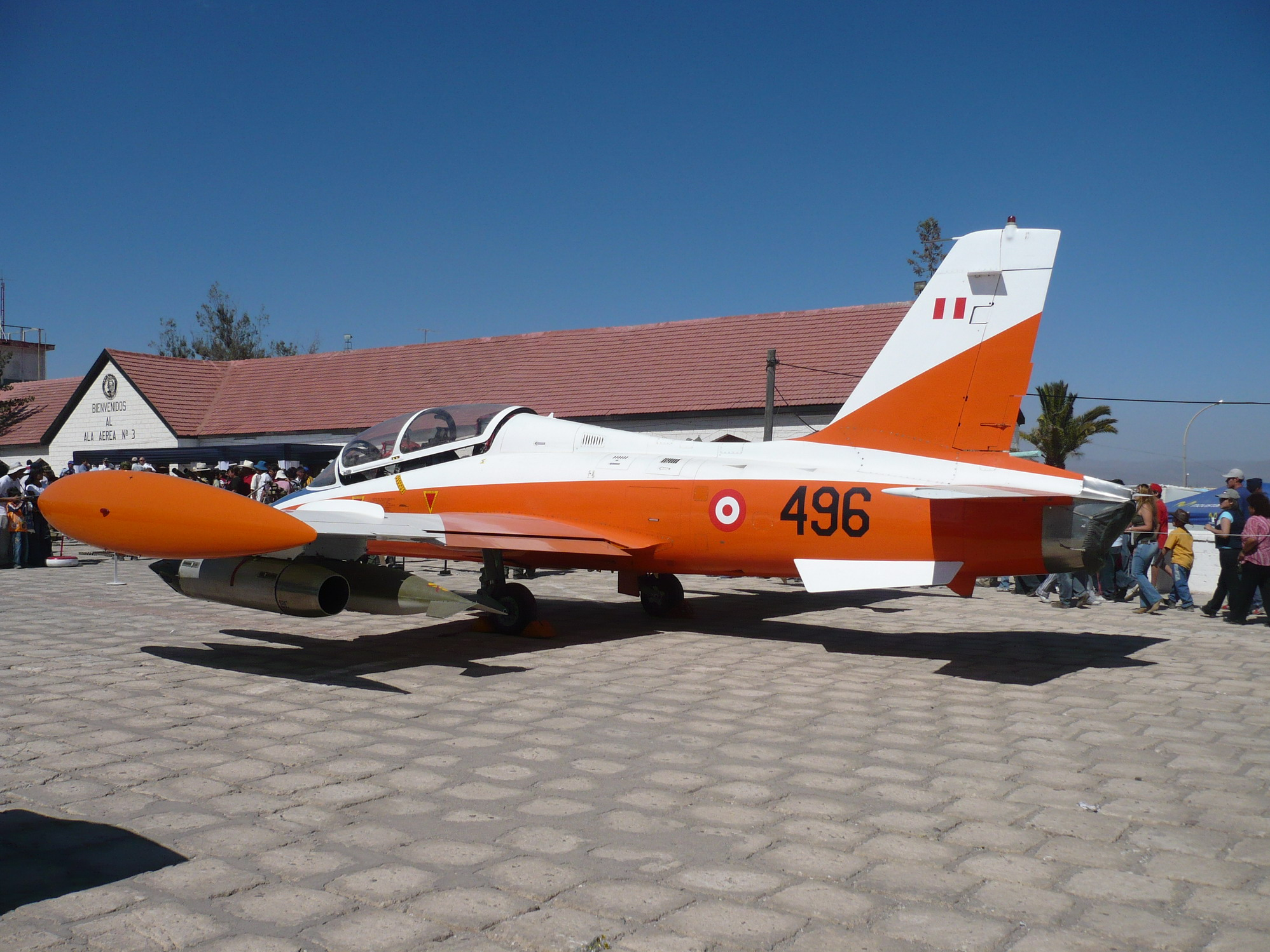 Aermacchi MB-339A